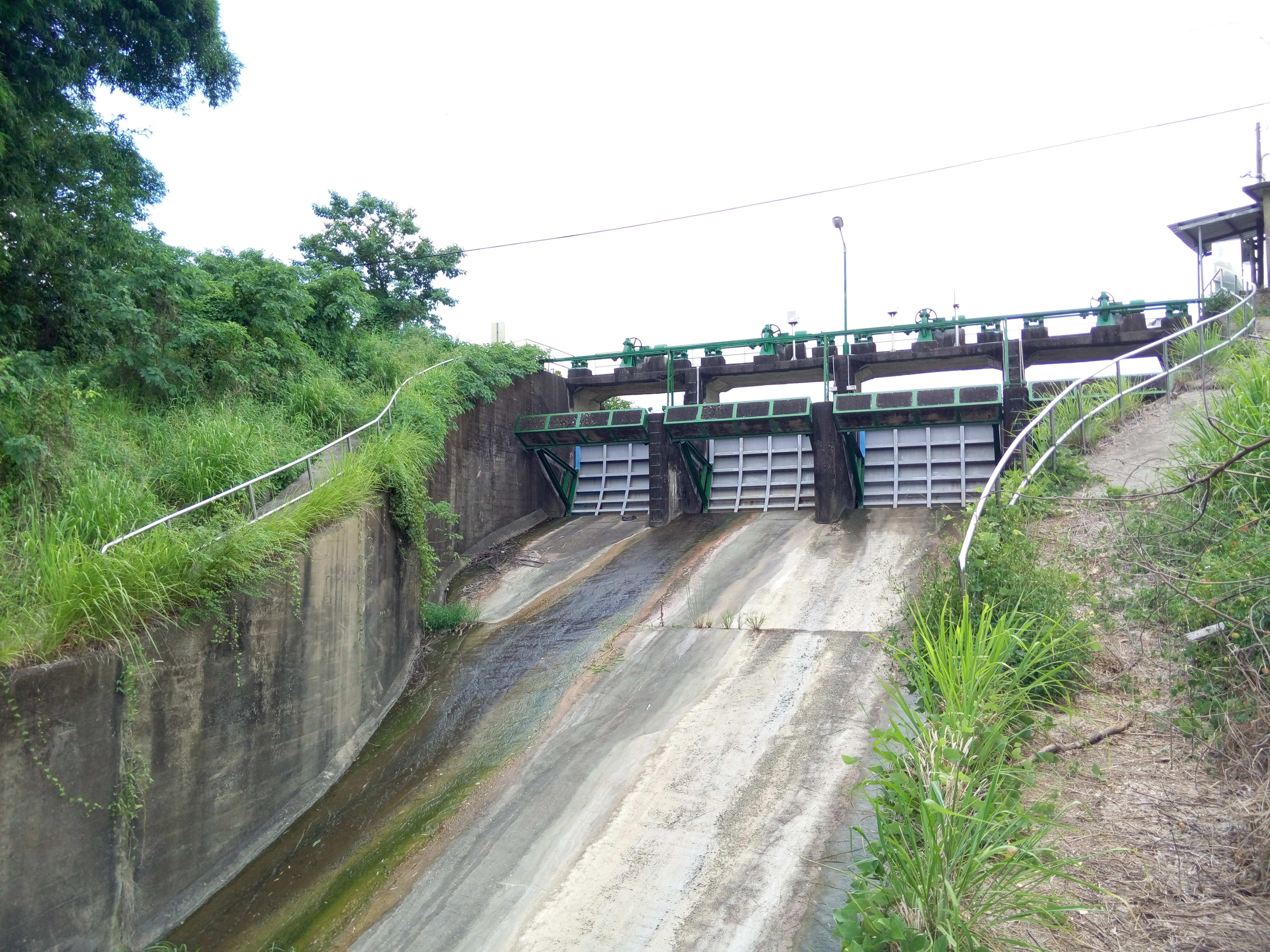 臺灣臺南市新化區鹽水埤水庫排洪道